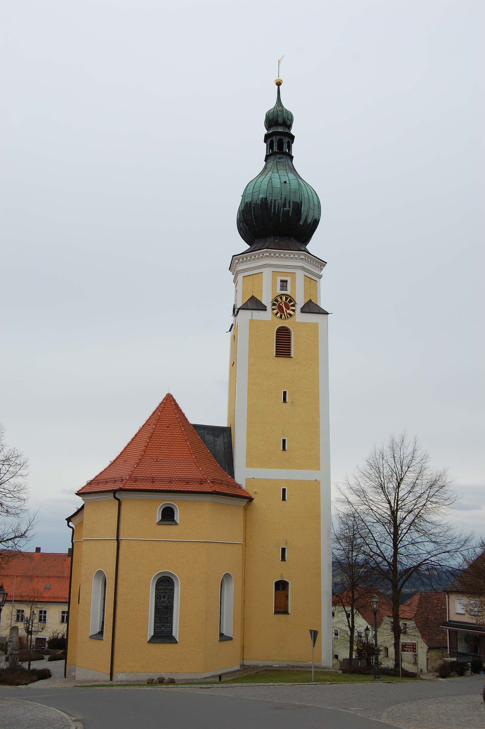 Pfarrkirche St. Michael, Tännesberg, Landkreis Neustadt an der Waldnaab, Oberpfalz, Bayern